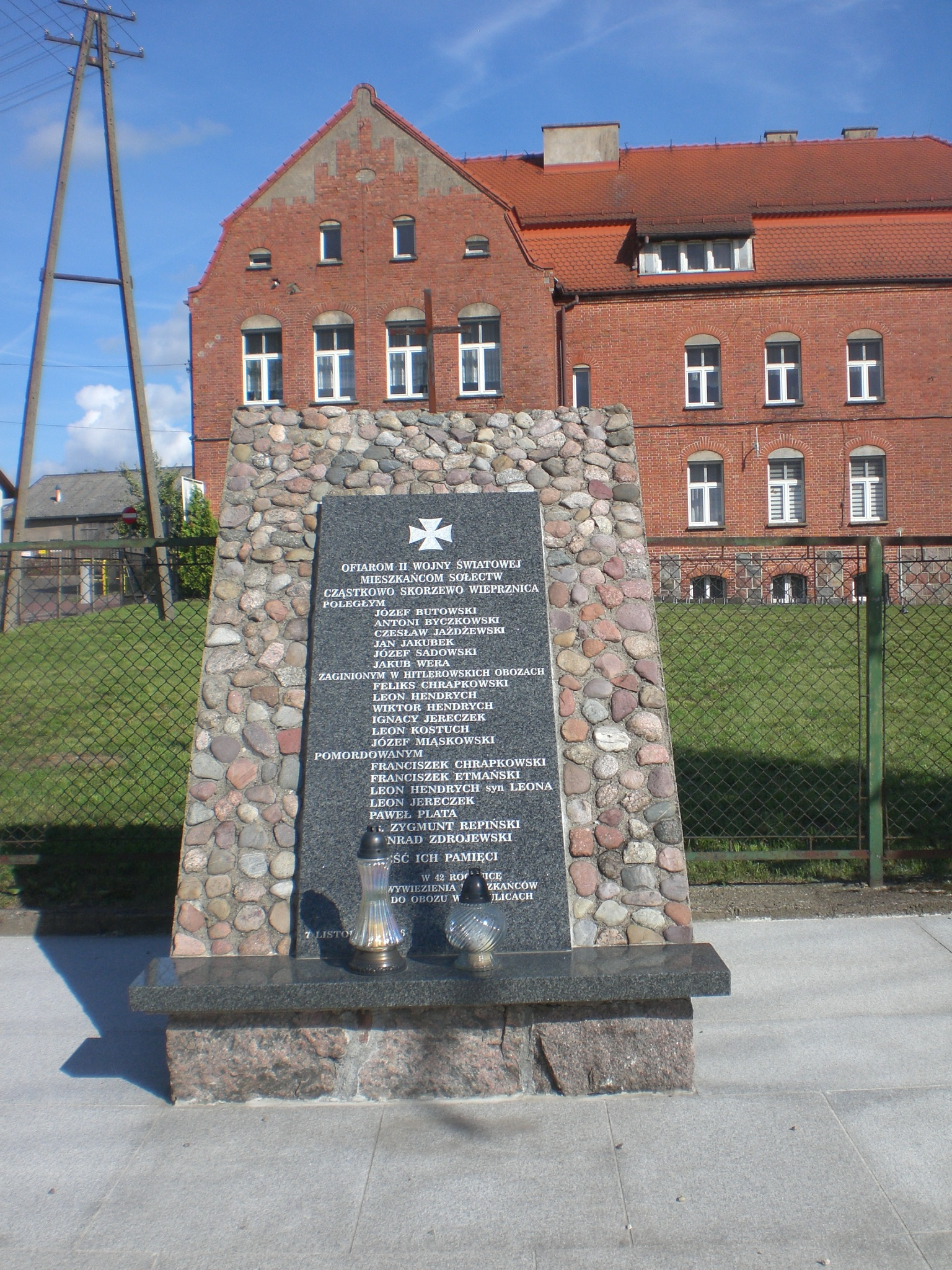 Skorzewo